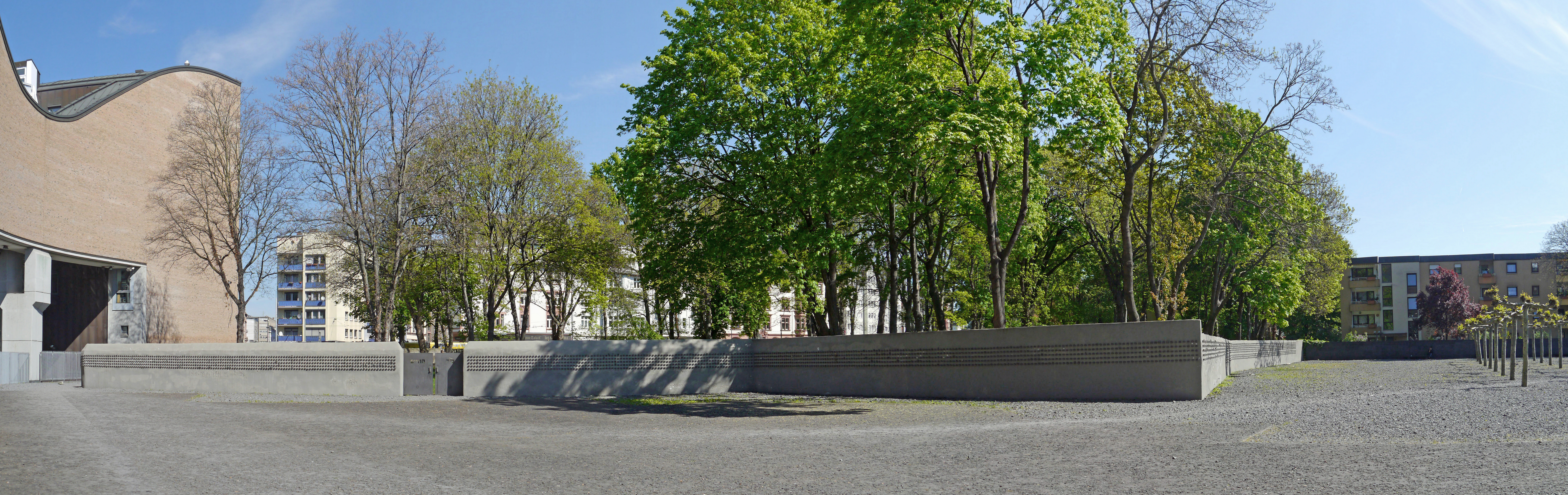 Der Alte Jüdische Friedhof an der Battonnstrasse. Ansicht von Süd-West in Frankfurt am Main.